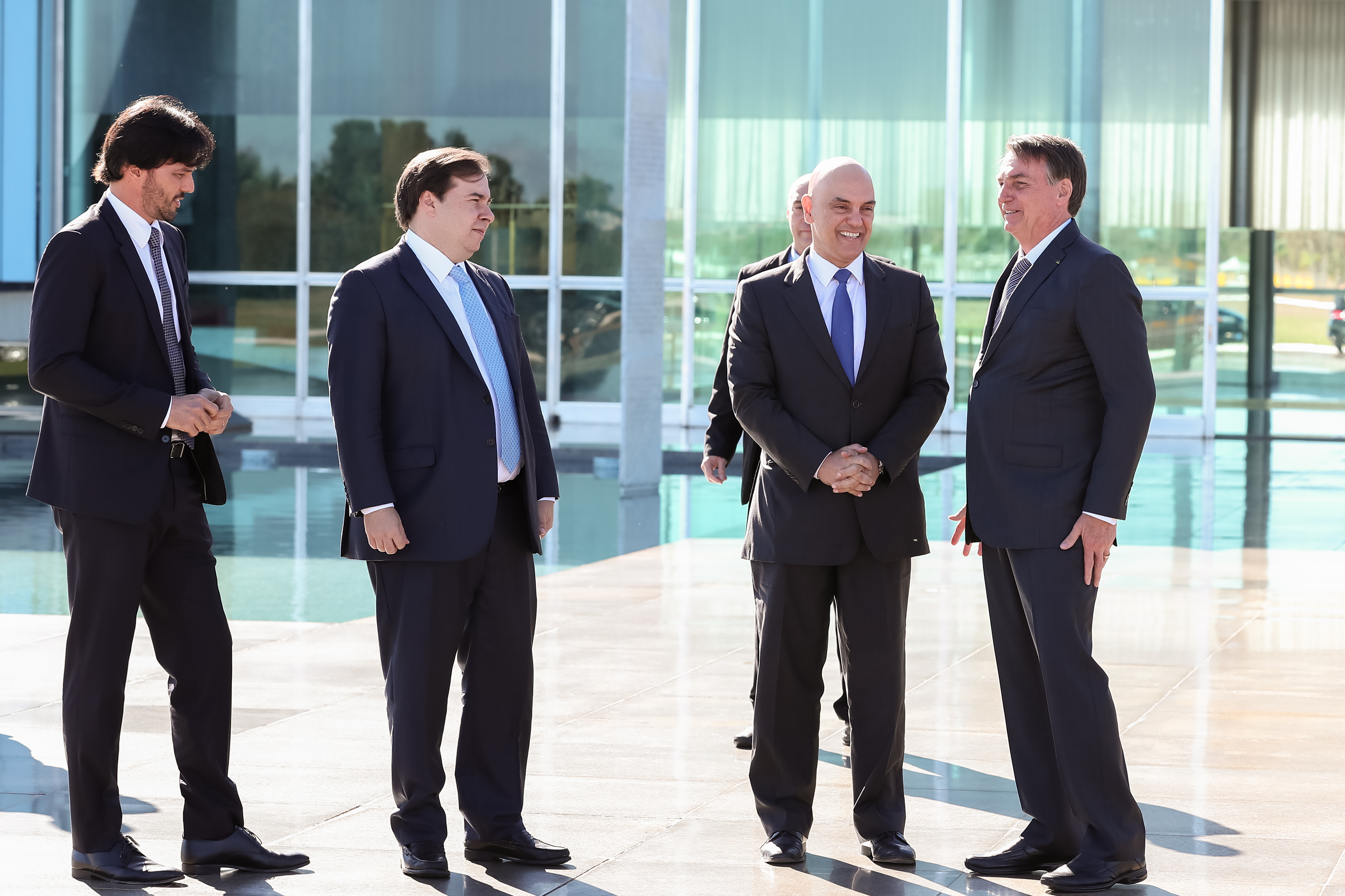 (Brasília - DF, 07/08/2019) Encontro com Deputado Rodrigo Maia, Presidente da Câmara dos Deputados; Alexandre de Moraes, Ministro do Supremo Tribunal Federal; e Deputado Fábio Faria (PSD-RN). Foto: Marcos Corrêa/PR